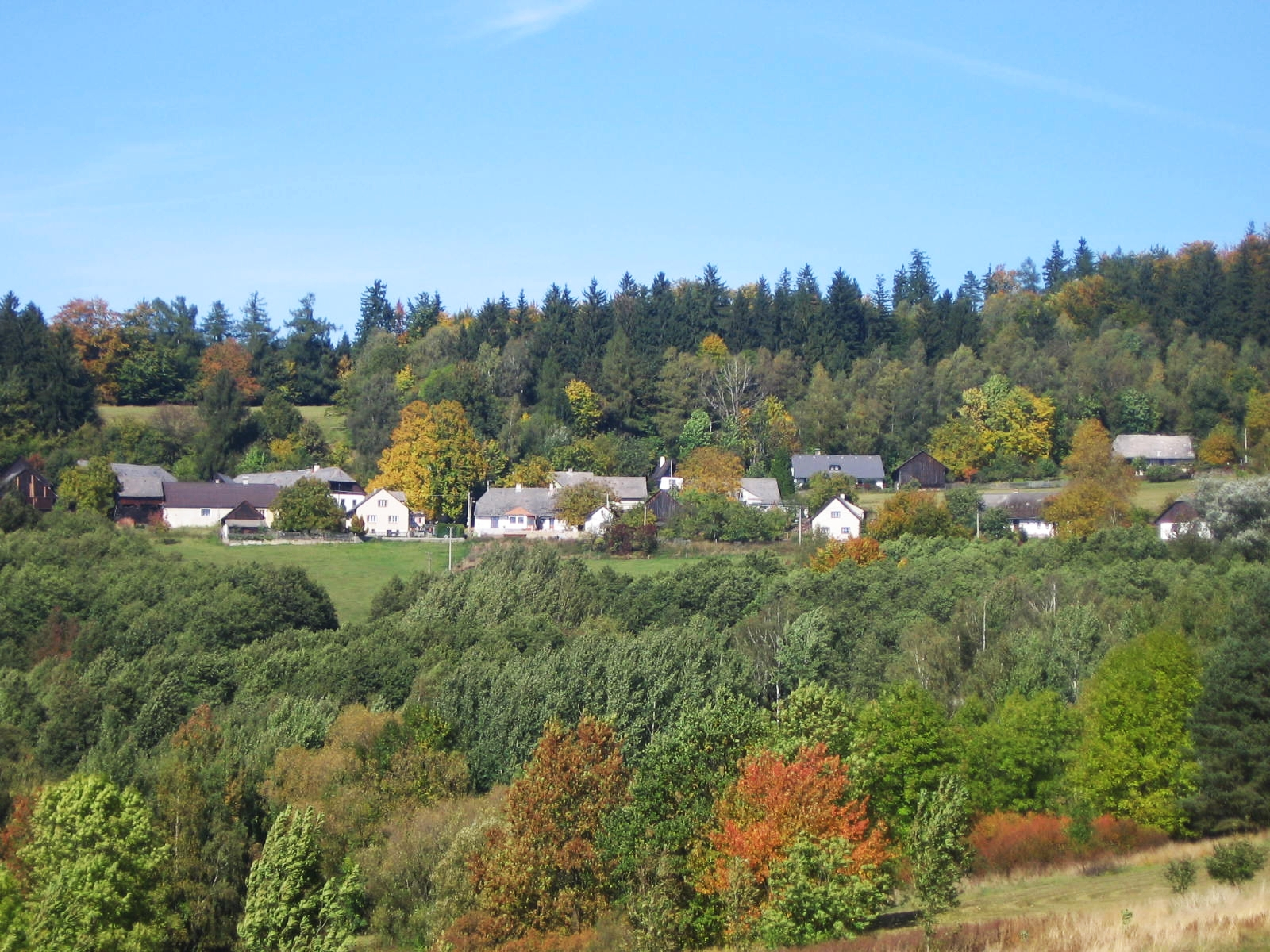 Branišov